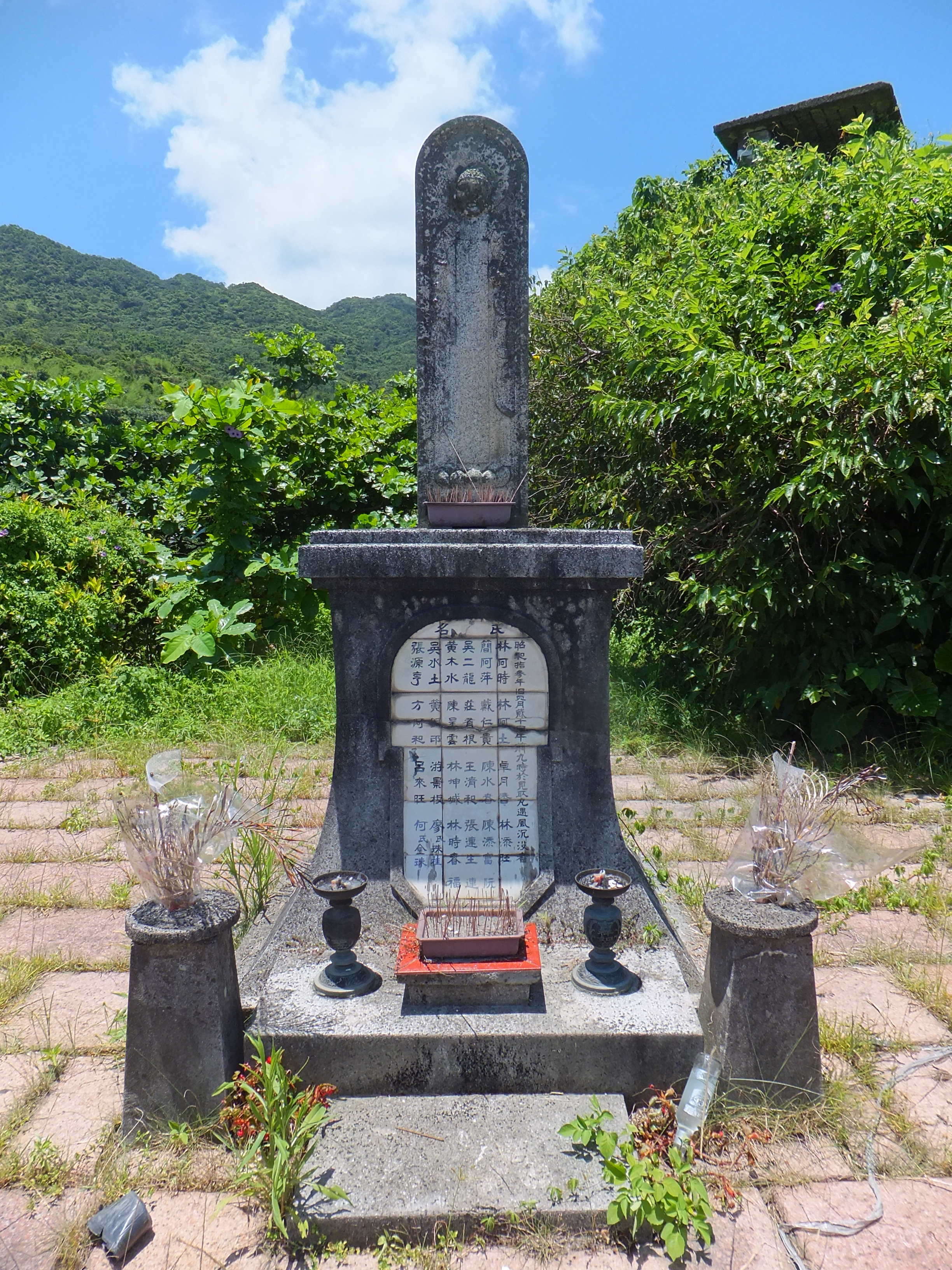 大溪漁港的龜山島遊覽遭難者之招魂碑